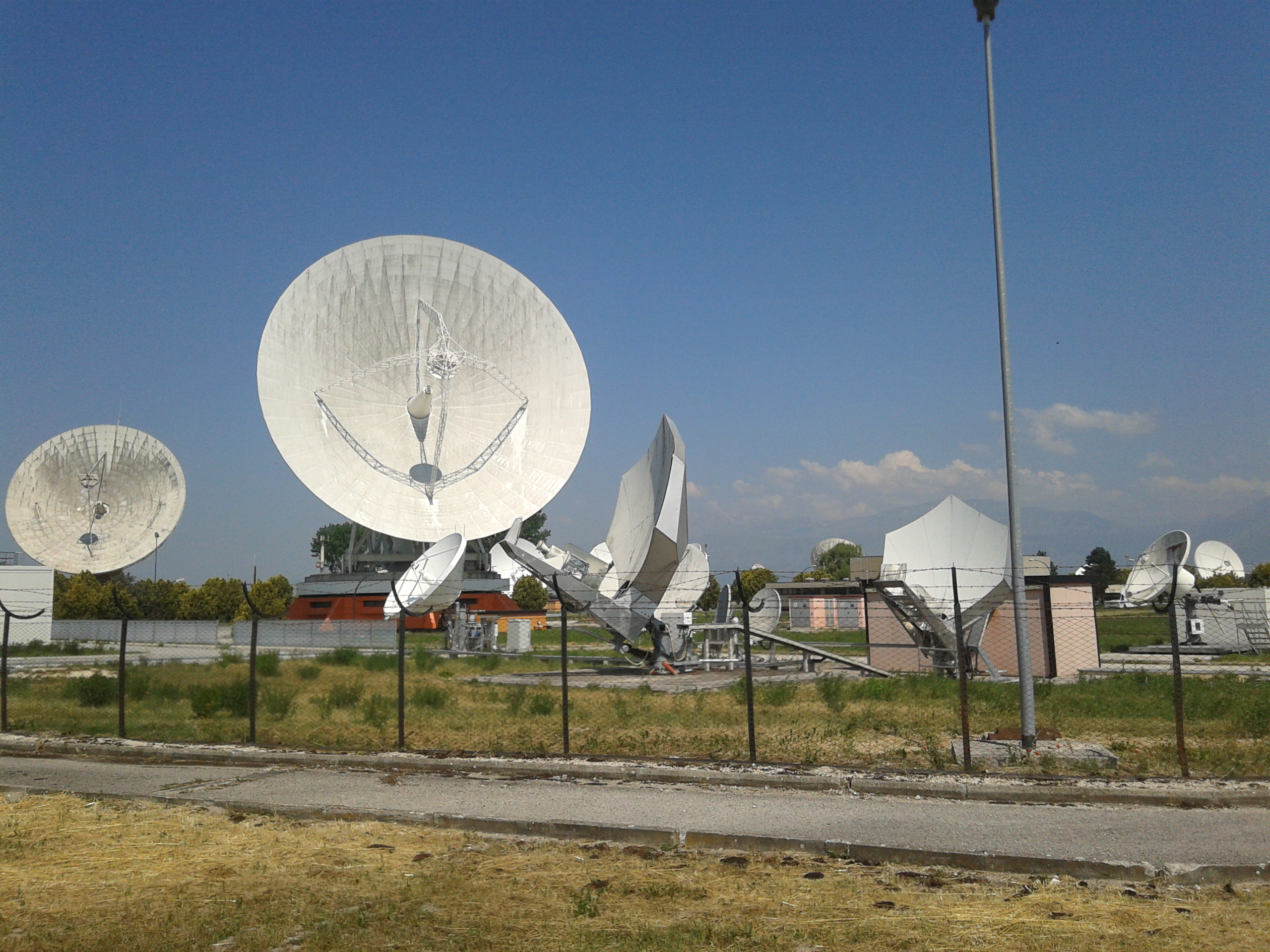 Stazione Piero Fanti (Telespazio)